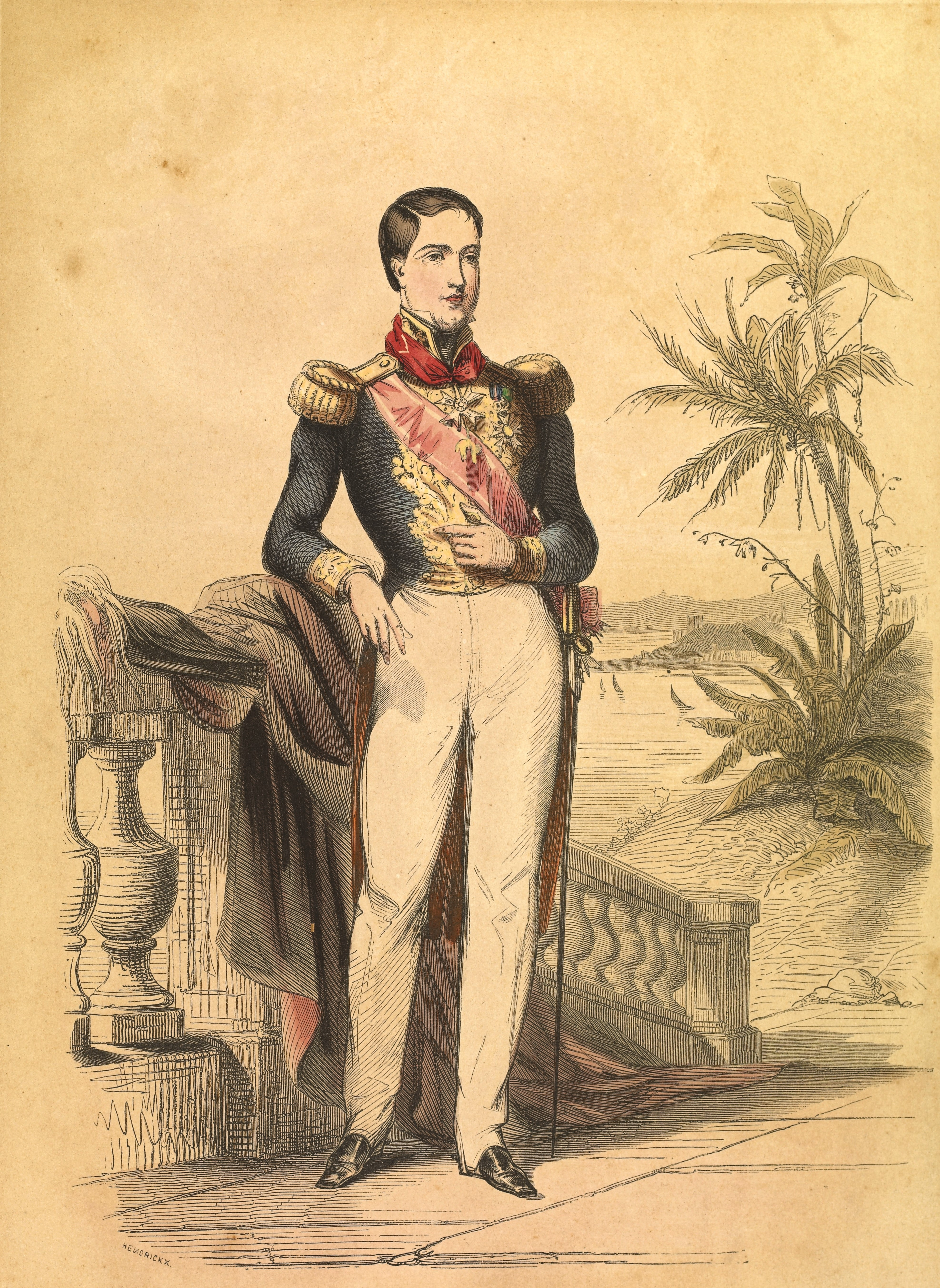 Fundo Correio da Manhã.